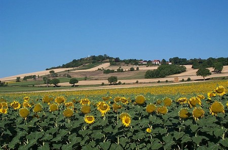 paysage luzillat